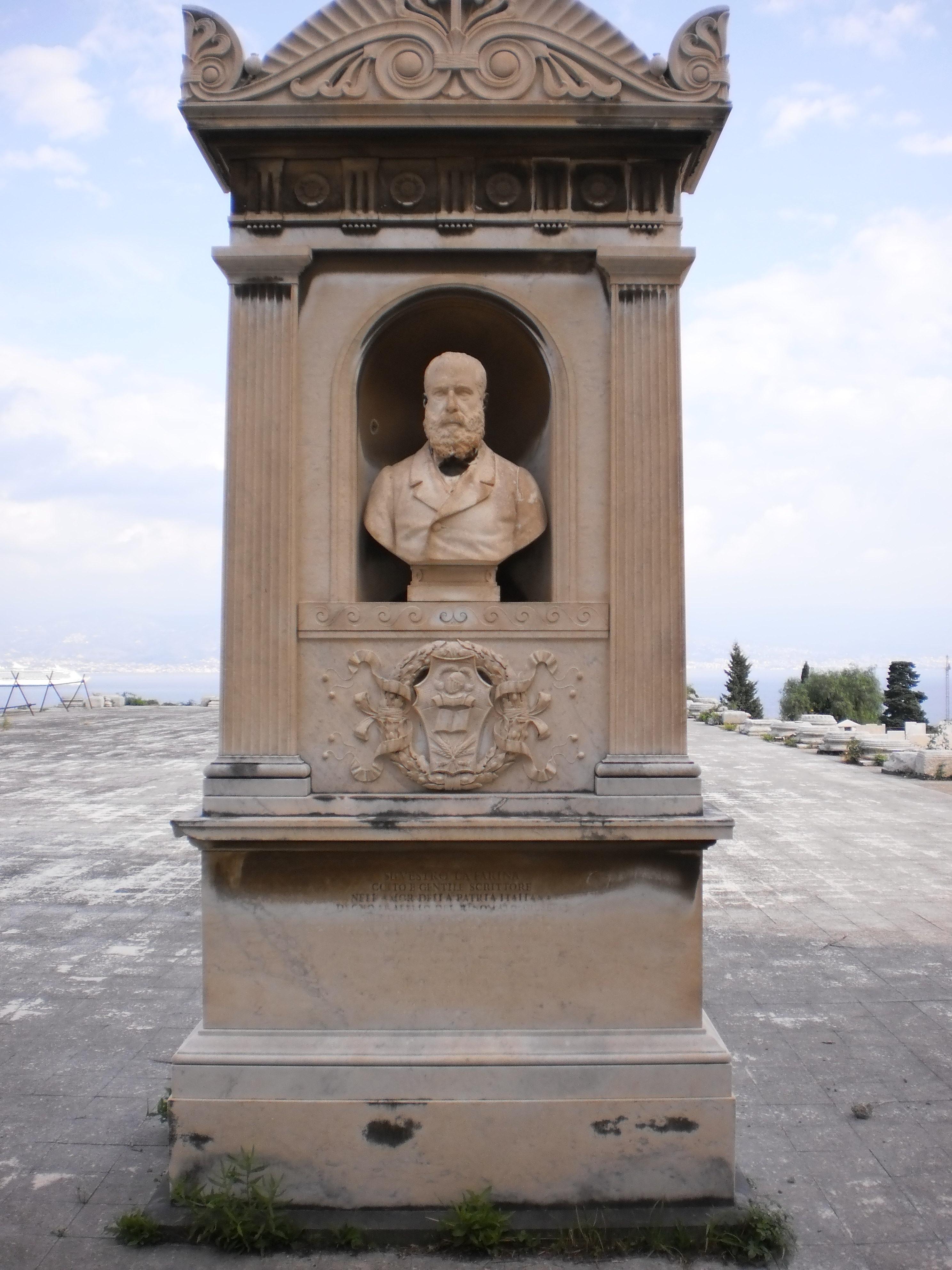 Monumento a Silvestro La Farina